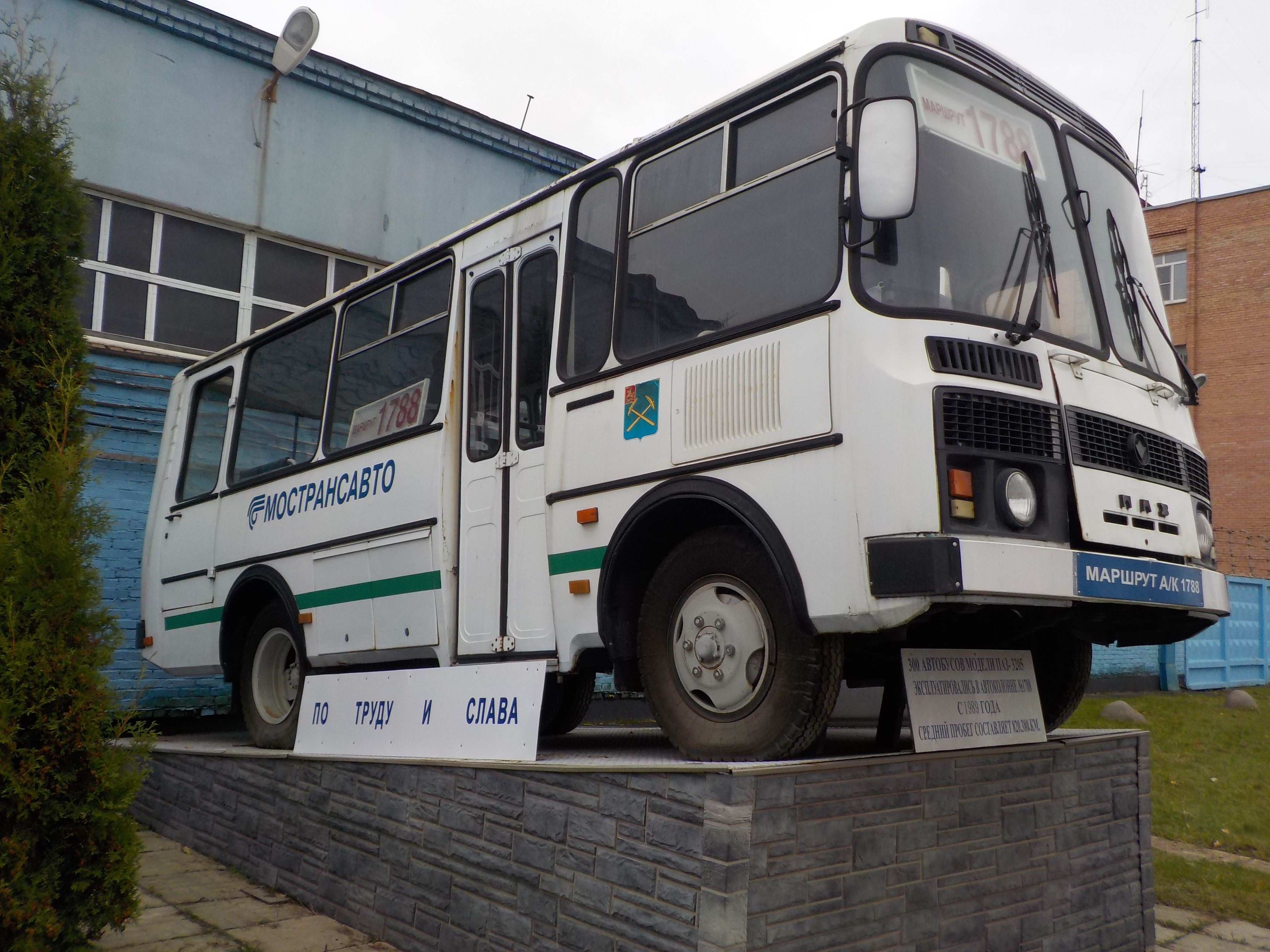 Автобус ПАЗ, установлен на а/к 1788, модель ПАЗ-3205